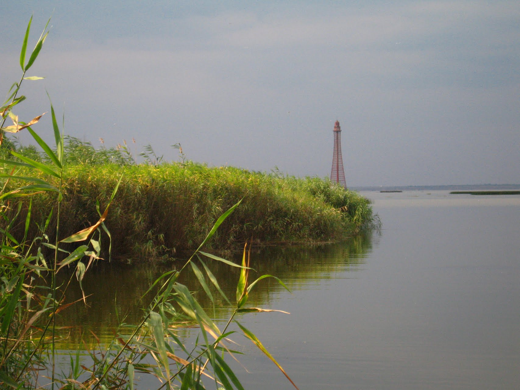 Leuchtturm vor Rybal'che